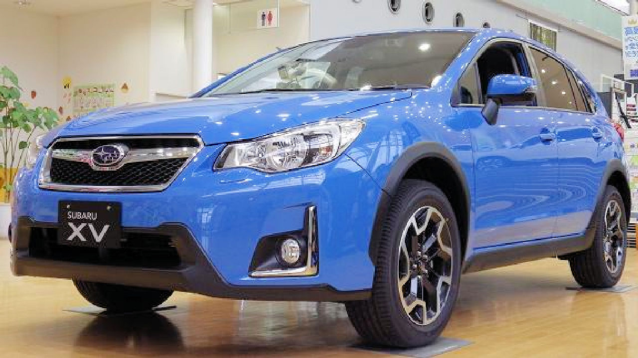 スバル XV 2.0i-L EyeSight